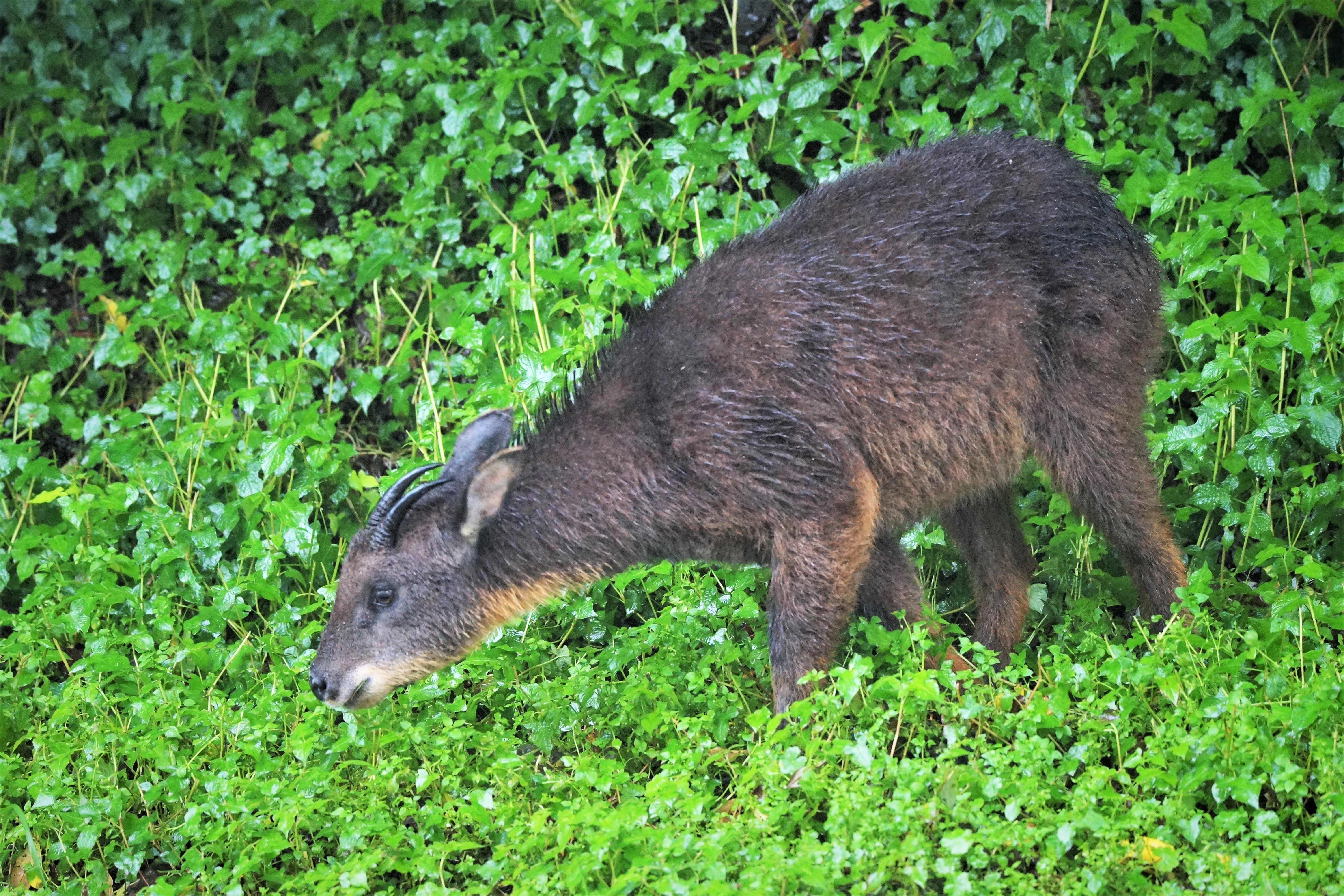 高海拔的山區.難得發現長鬃山羊出沒.